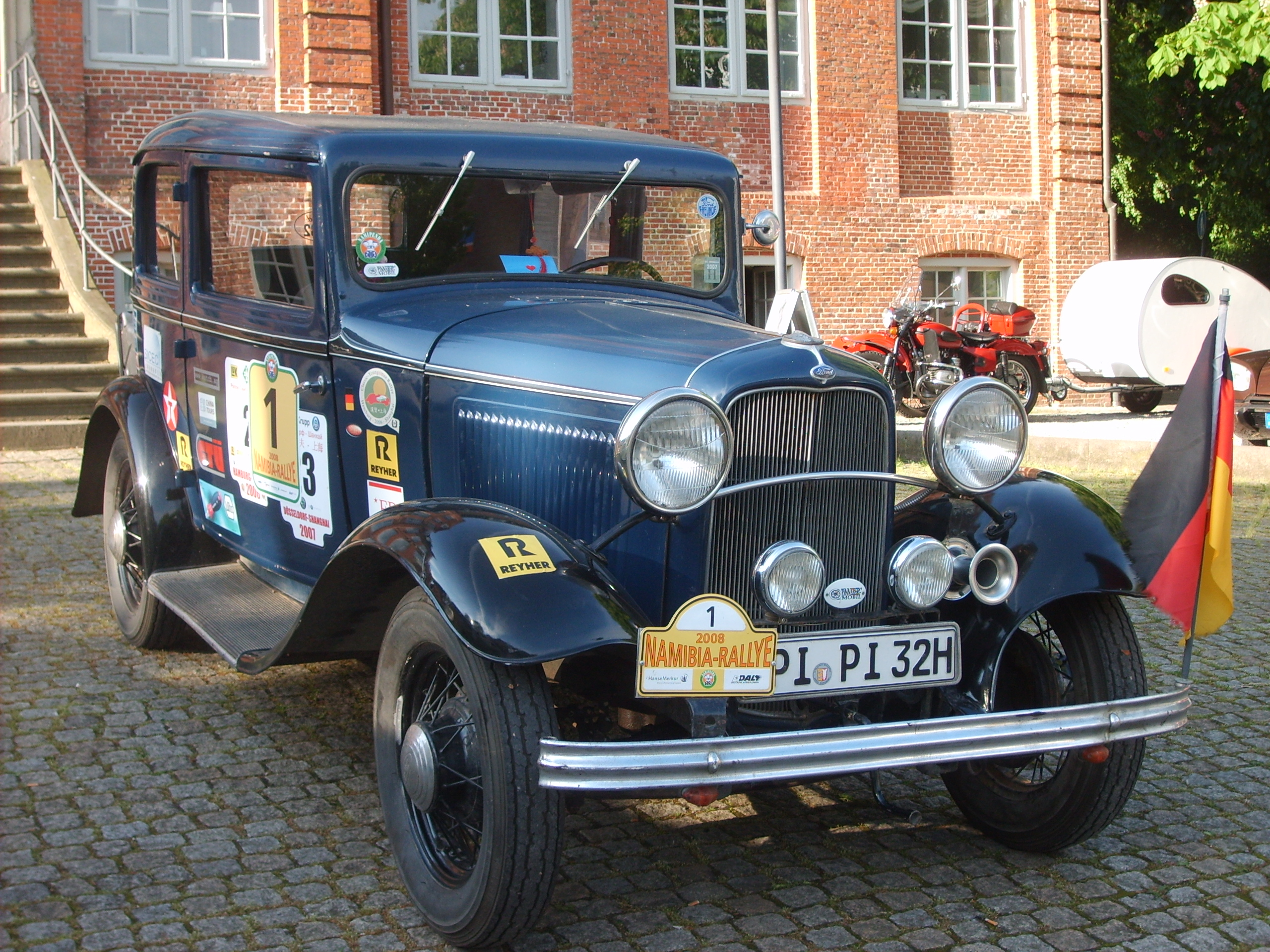 Ford B 13/50 Rheinland, Baujahr 1932 bei der Pinneberg Mobil